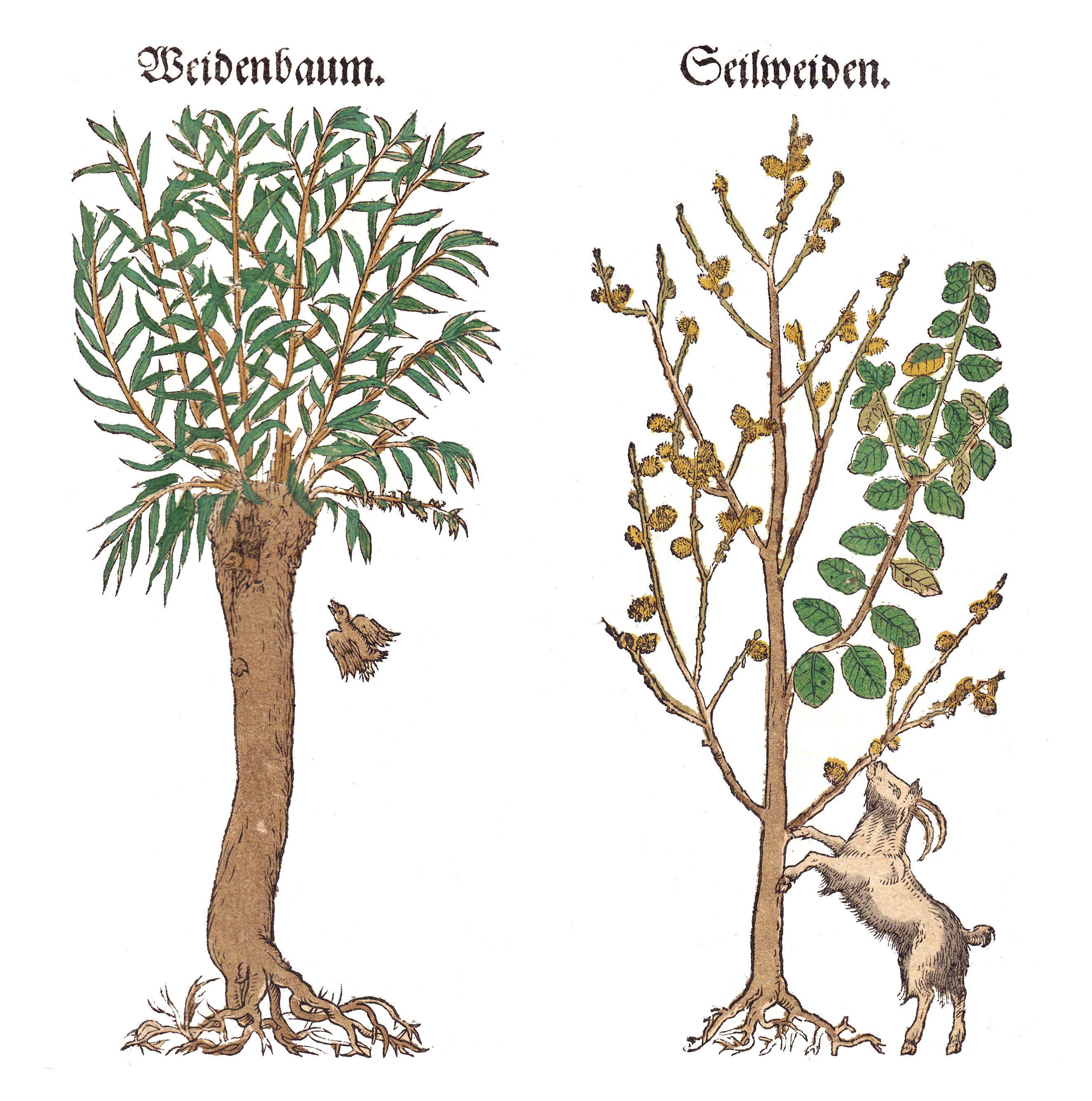 Abbildung von Weiden